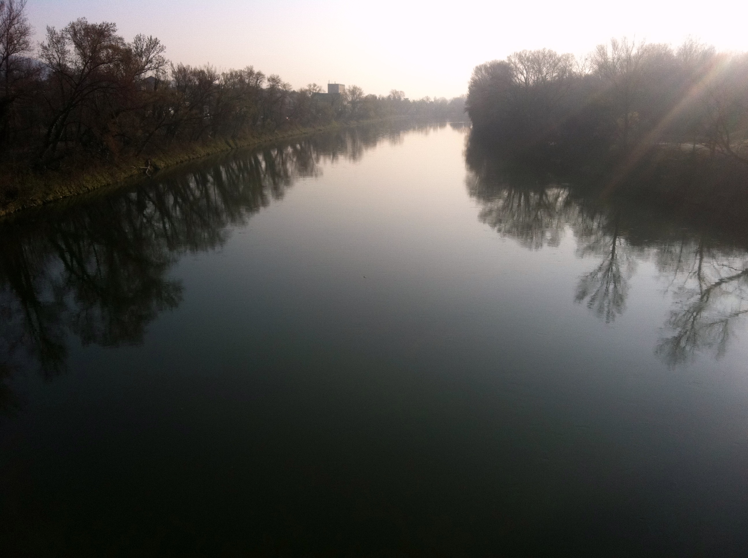 Vue du canal de Miribel depuis la passerelle de Miribel dans l'Ain, le matin du 24 mars 2011.